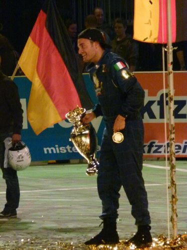 Giovanni Zarrella, Sieger der Autoball-EM 2012